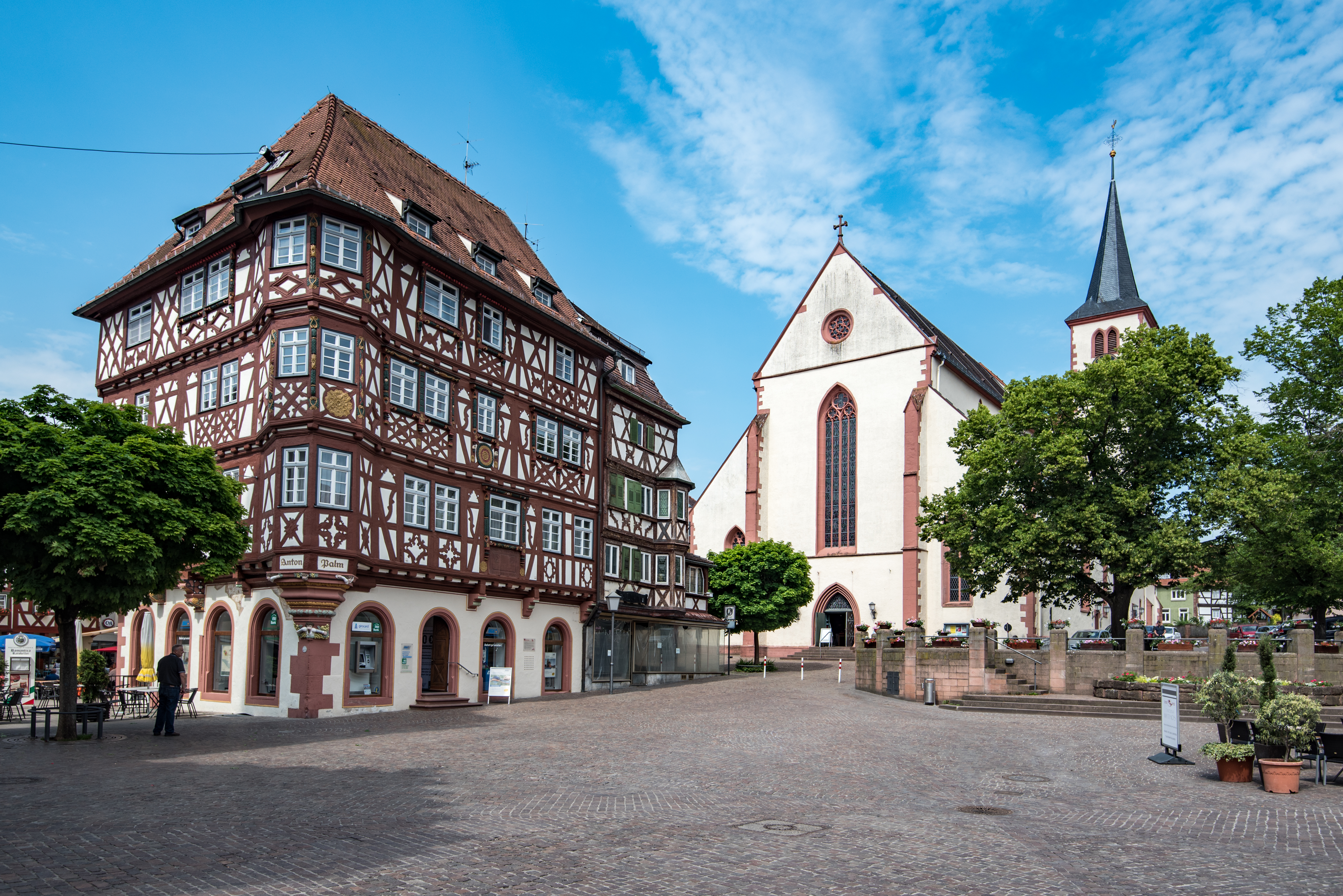 Mosbach, Hauptstraße 46, Haus Palm, Stiftskirche, von Westen